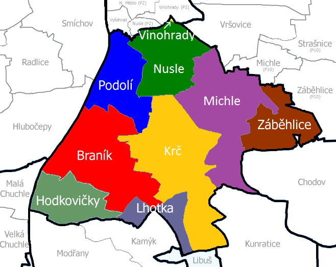 Prague 4 - map of cadastral areas / Praha 4 - mapa katastrálních území